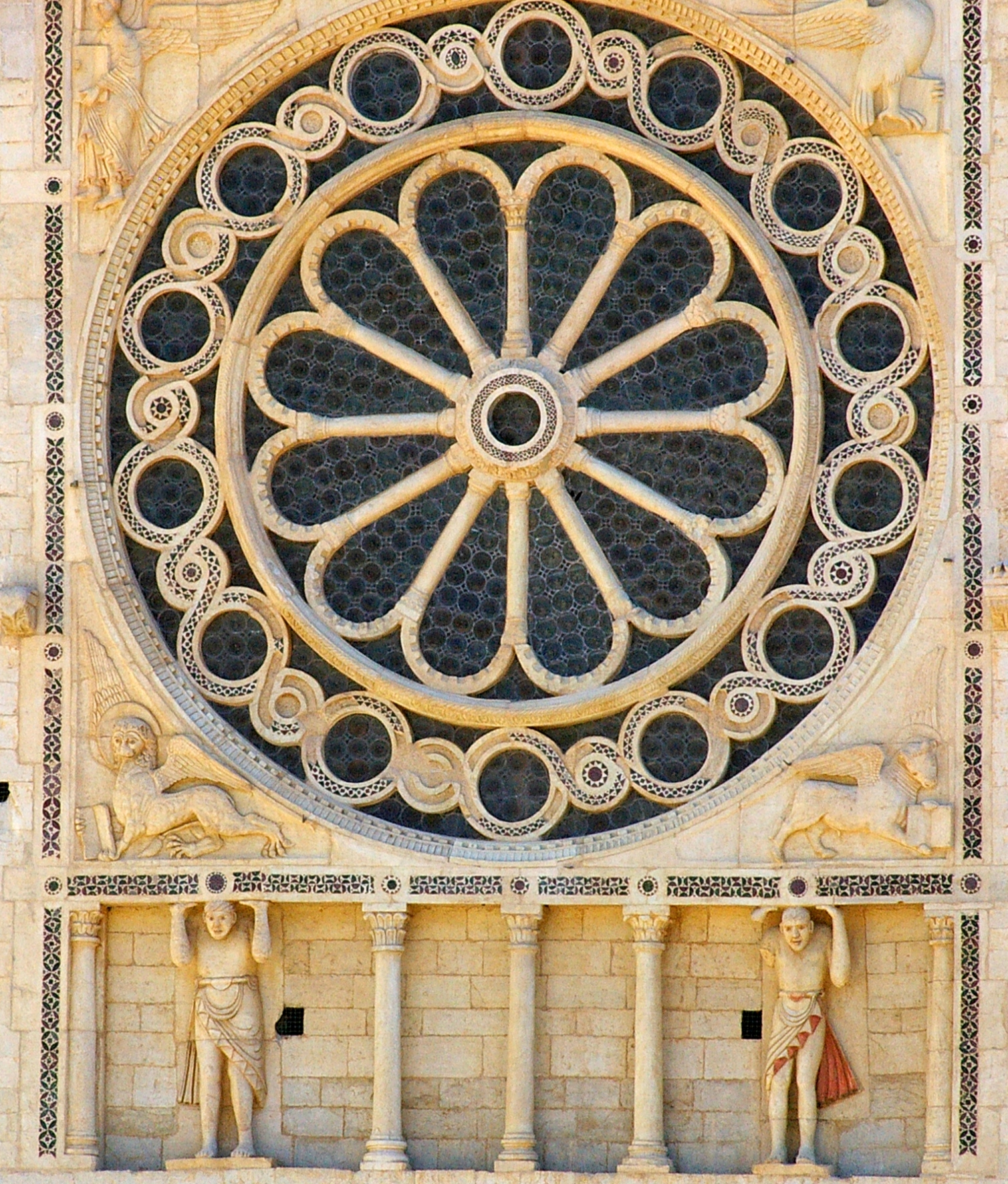 Spoleto , Umbria, Italia